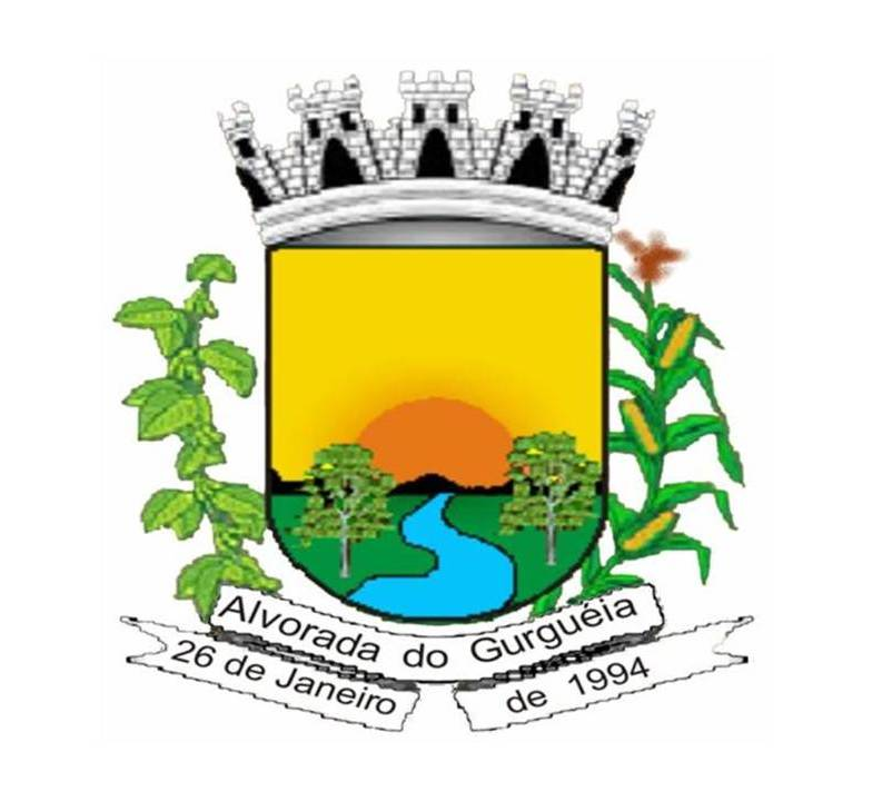 BRASÃO DO MUNICIPIO DE ALVORADA DO GURGUEIA